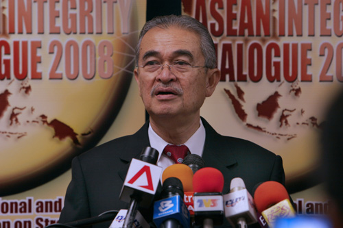 AID 08